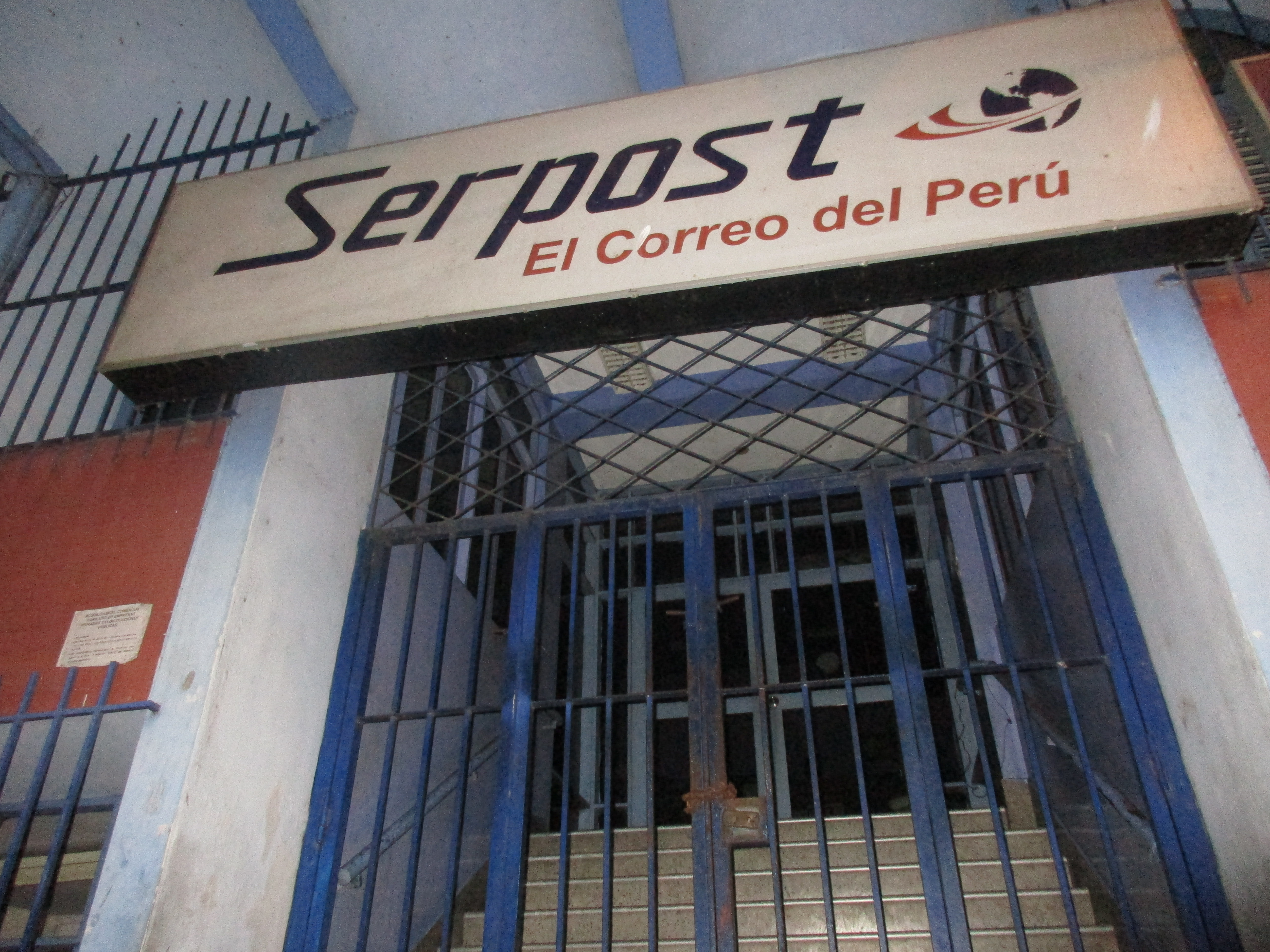 Agencia de entrega y envíos de cartas Serpost en Iquitos